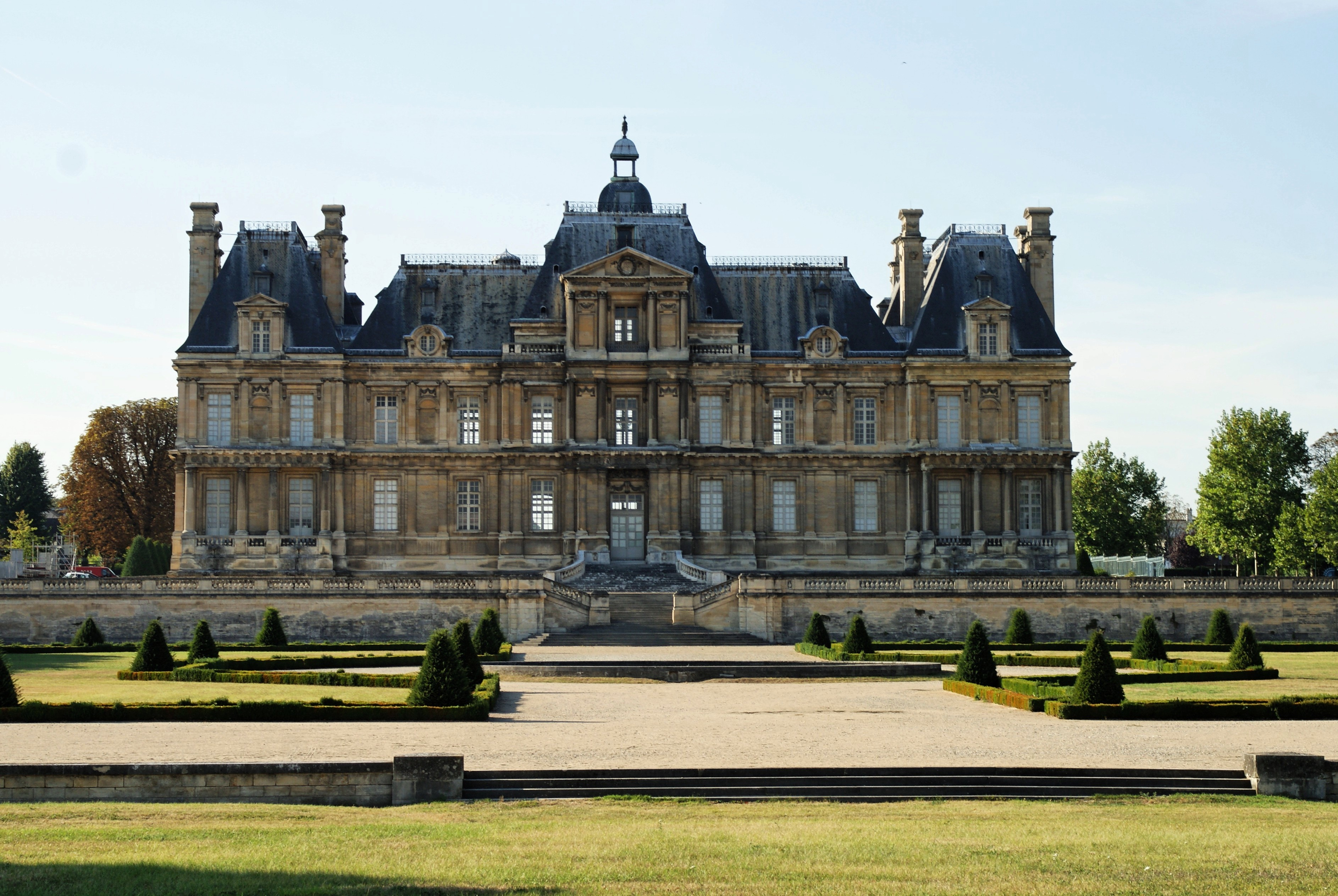 Le chateau de Maisons Laffitte.